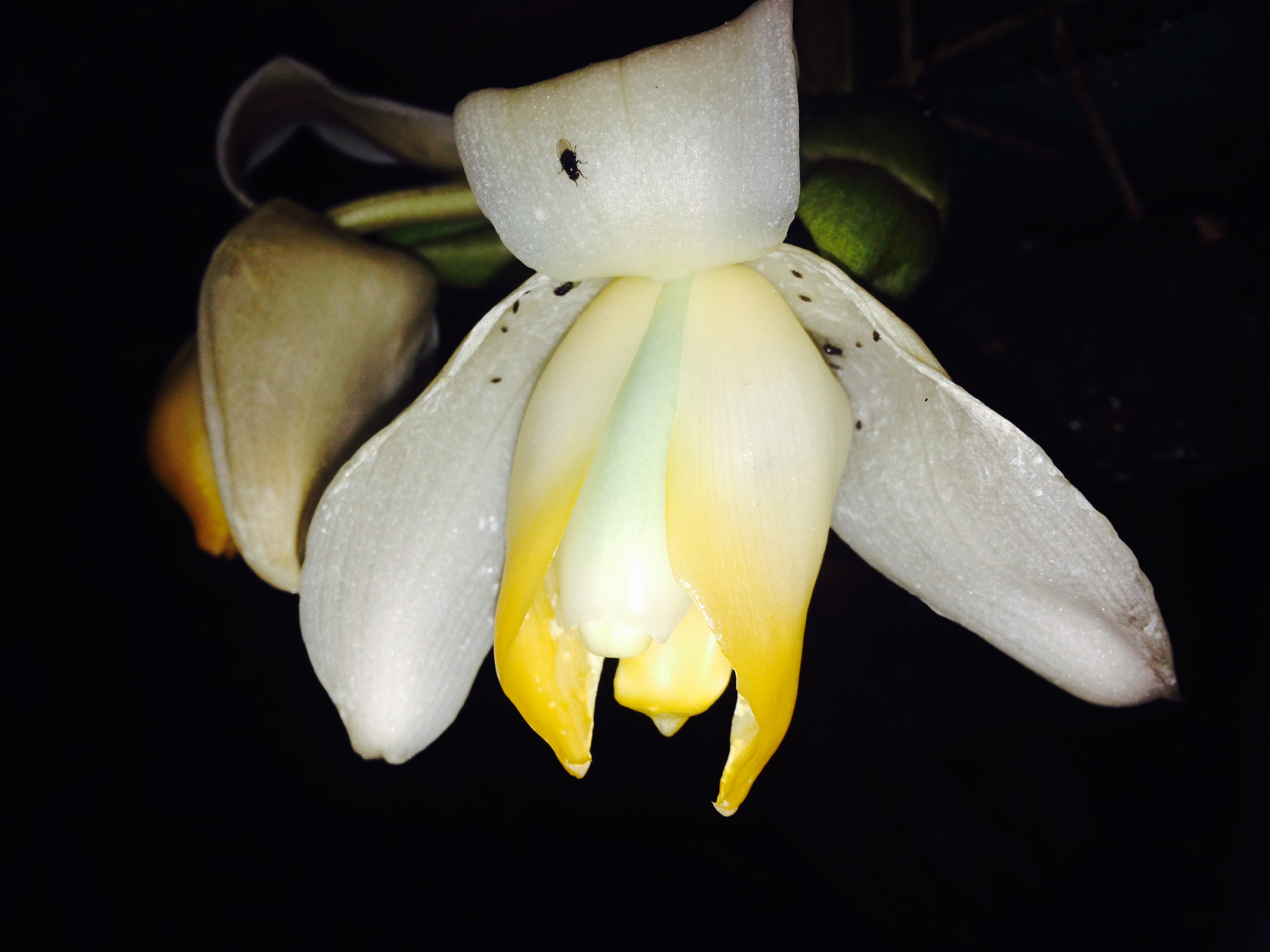 ORQUIS MINDO